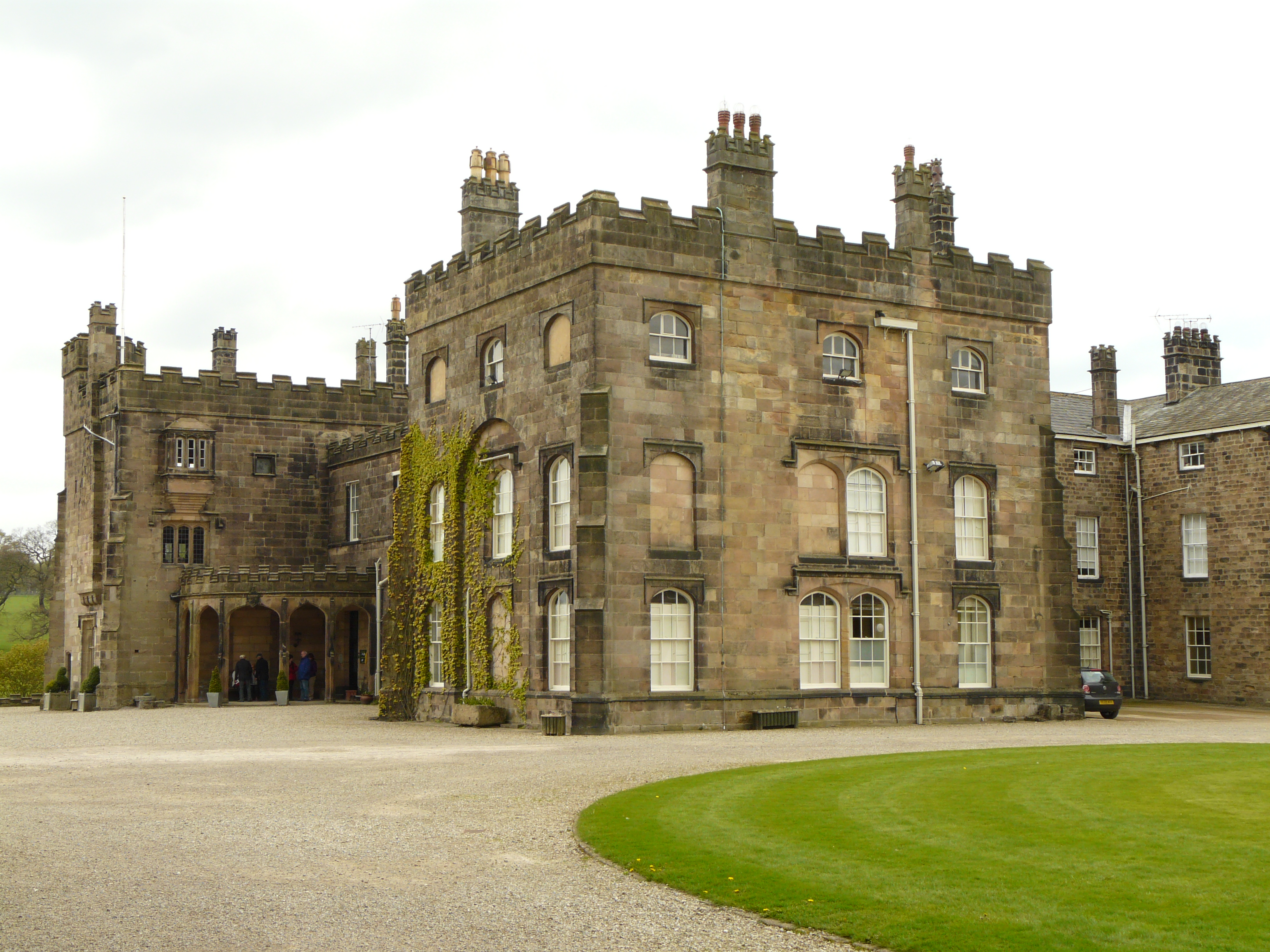 Vue du Yorkshire en Angleterre.